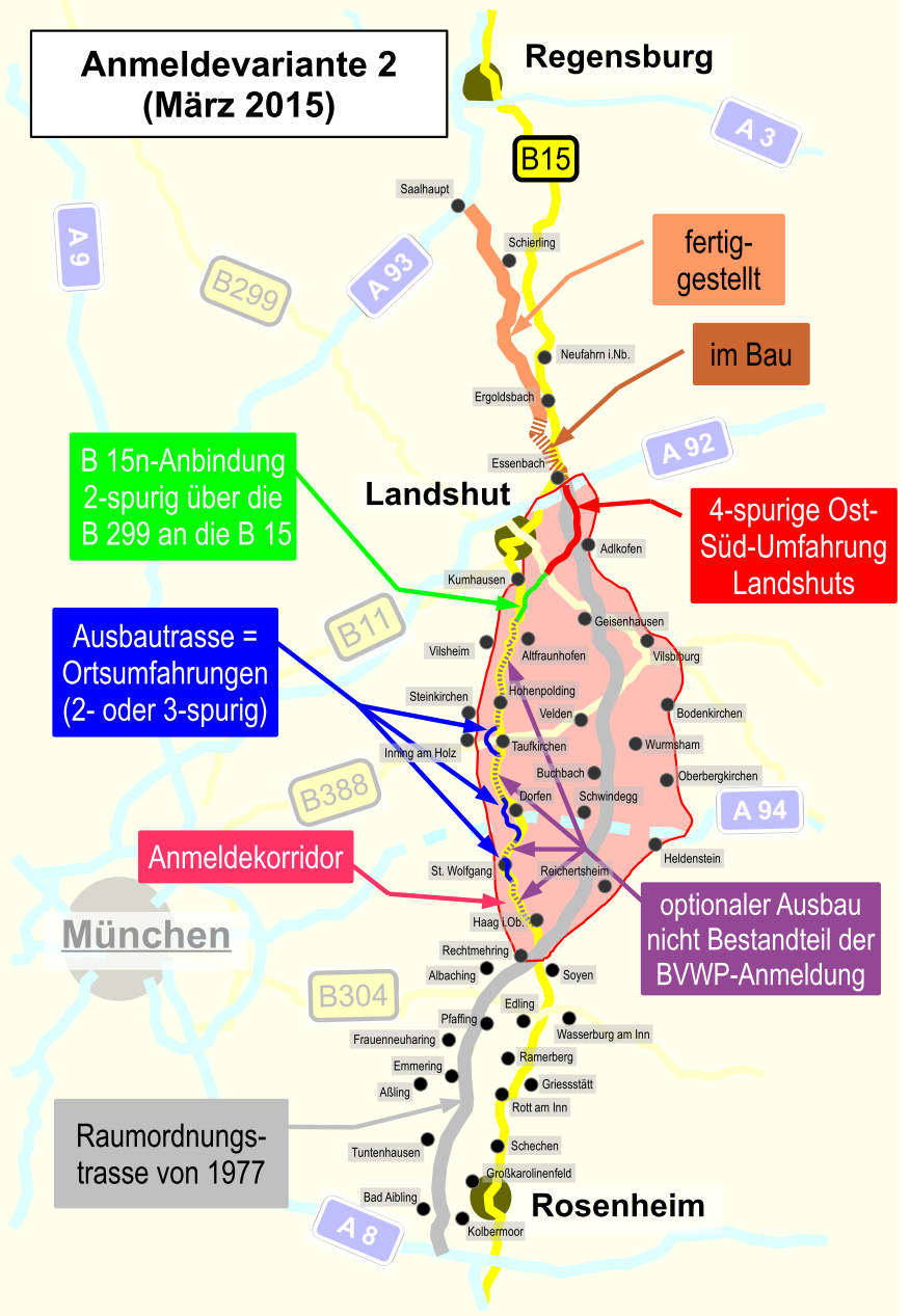 BVWP 2015-Anmeldetrasse für B 15n - Variante 2 / Projekt B015-G070-BY